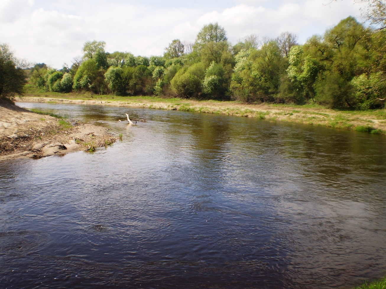 Nevėžis prie Burvelių alkakalnio, Panevėžio raj.